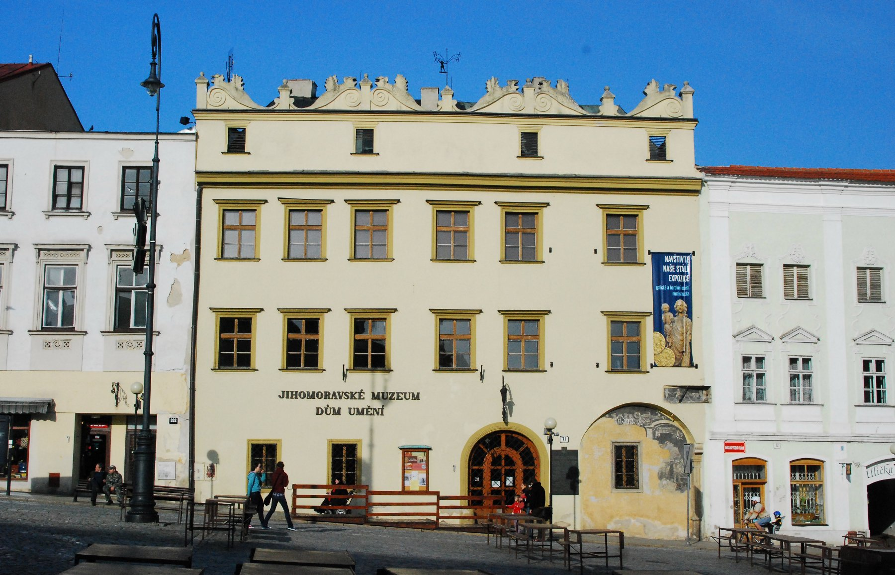 Standort des Südmährischen Museum auf dem Unteren Platz in Znaim